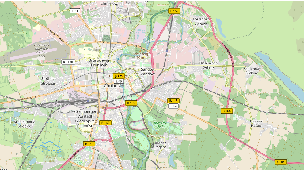 Verkehrsplan der Stadt Cottbus This map may be incomplete, and may contain errors. Don't rely solely on it for navigation.